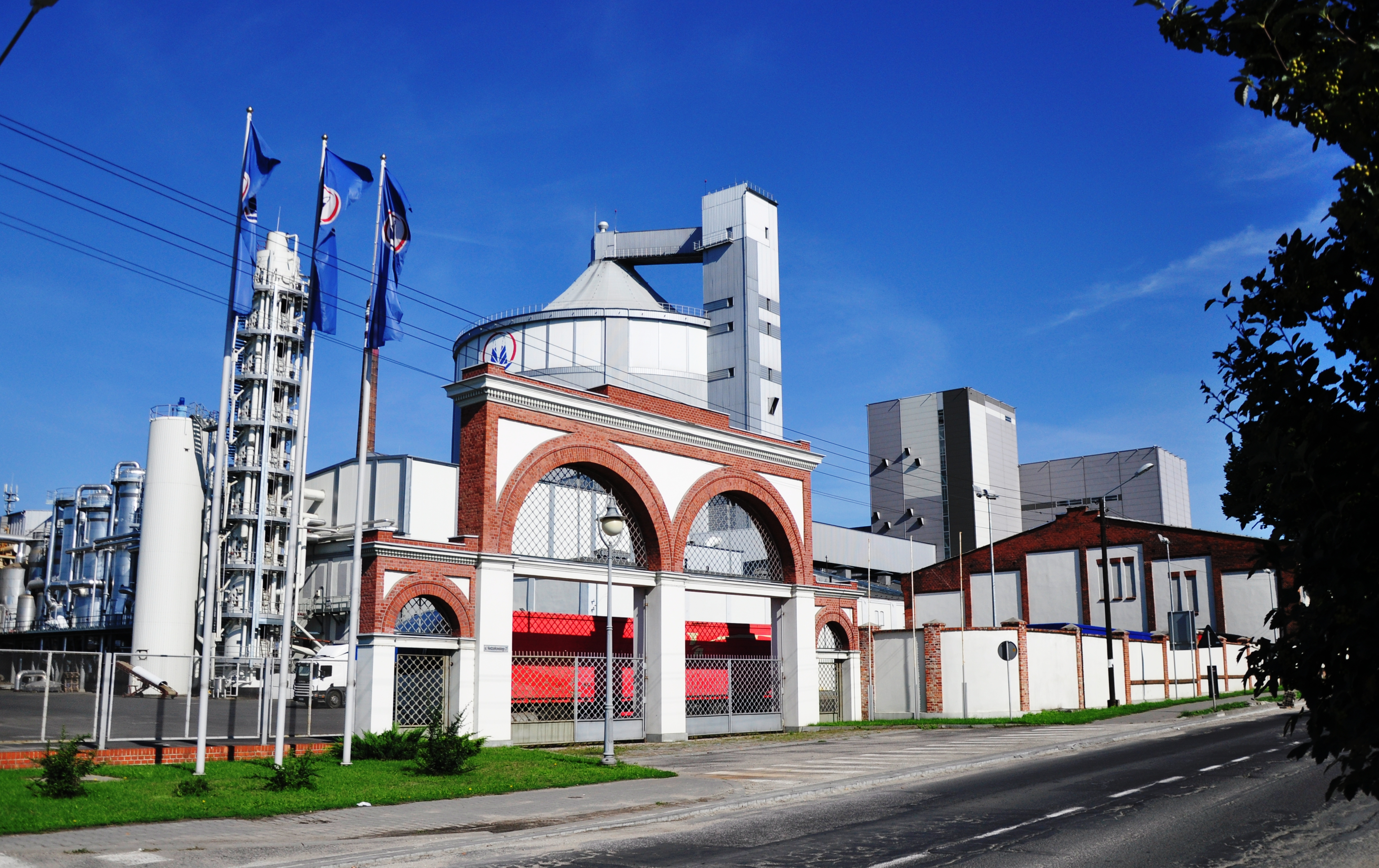 Sroda Zuckerfabrik